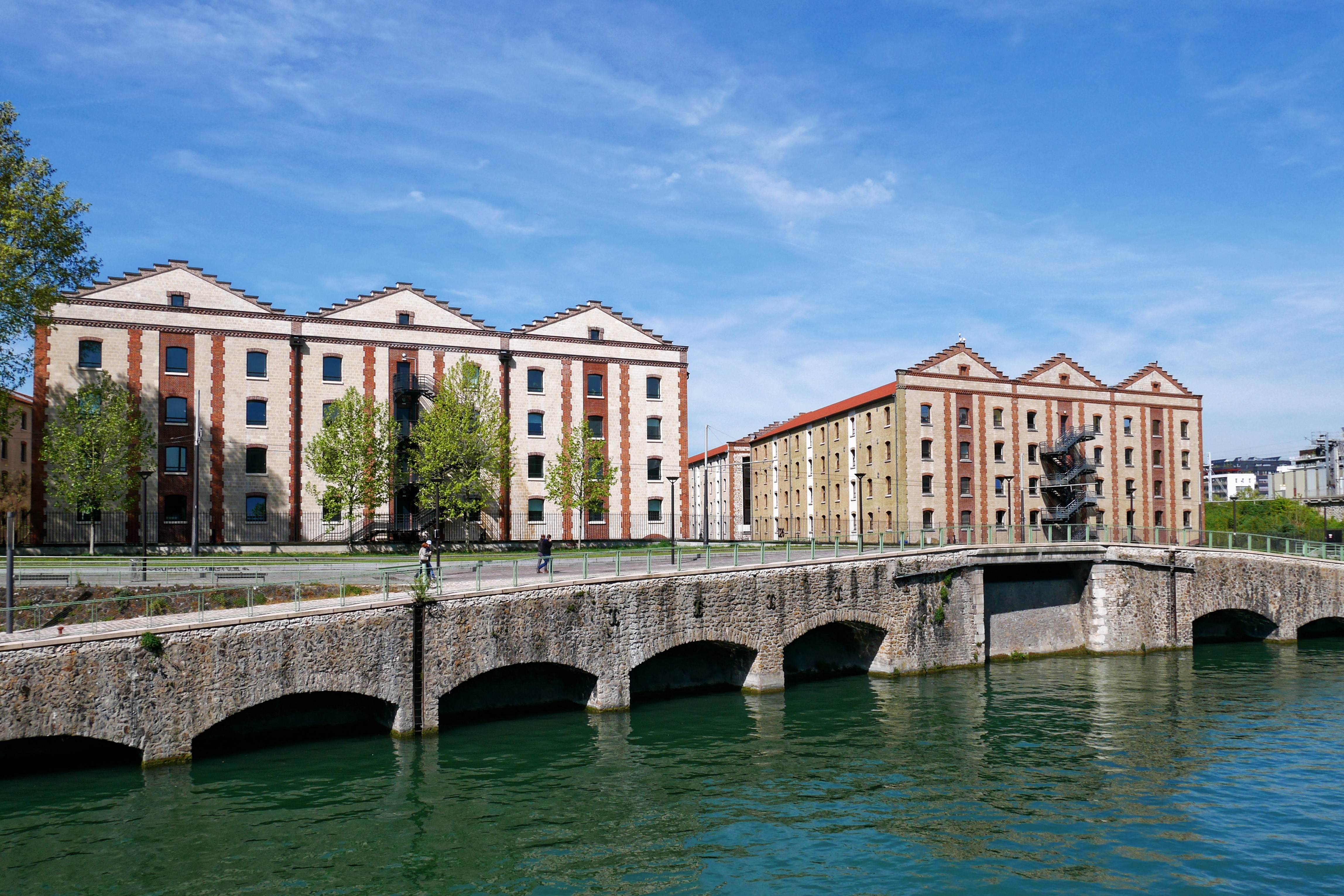 A PARIS